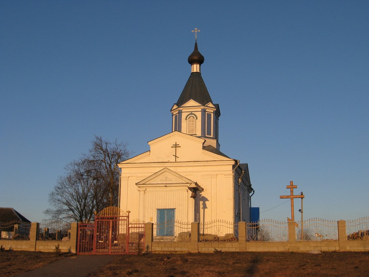 Возера. Царква